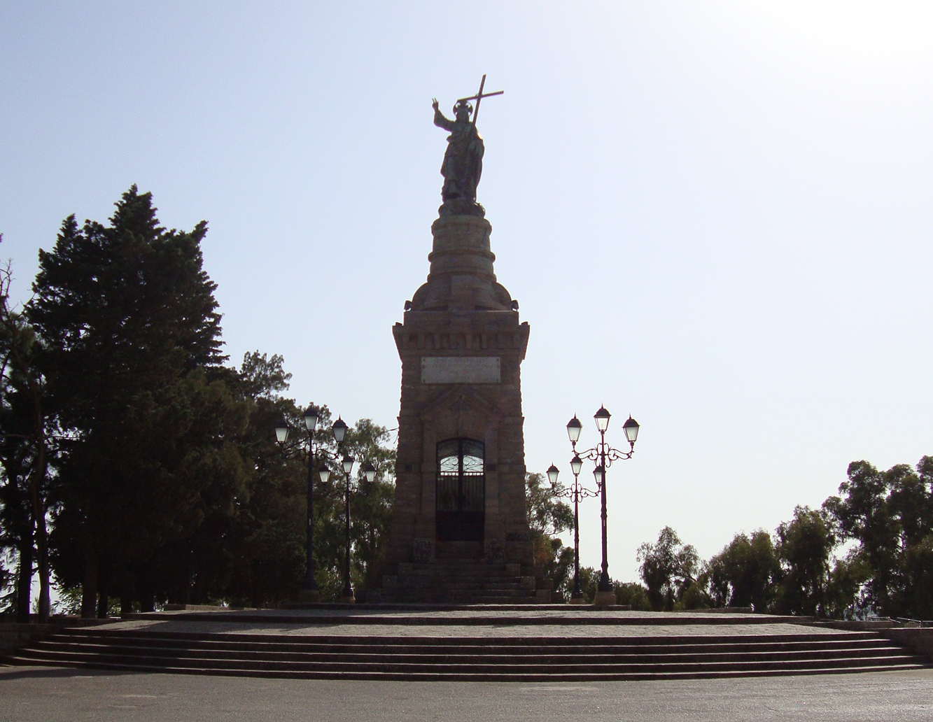 Monumento al Cristo Redentore, eretto nel 1900 per volere di papa Leone XIII e situato sul monte San Giuliano di Caltanissetta a circa 700 m.s.l..